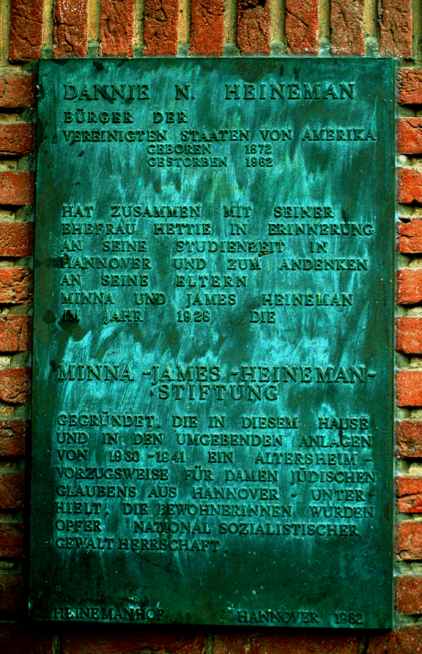 Eine Gedenktafel aus dem Jahr 1982 am Haupteingang zum Heinemanhof erläutert: "Dannie N. Heineman, Bürger der Vereinigten Staaten von Amerika, geboren 1872, gestorben 1962, hat zusammen mit seiner Ehefrau Hettie in Erinnerung an seine Studienzeit in Hannover und im Andenken an seine Eltern Minna und James Heineman im Jahr 1928 die Minna-James-Heineman-Stiftung gegründet, die in diesem Hause und in den umgebenden Anlagen von 1930 - 1941 ein Altersheim - vorzugsweise für Damen jüdischen Glaubens aus Hannover - unterhielt. Die Bewohnerinnen wurden Opfer Nationalsozialistischer Gewaltherrschaft. Heinemanhof, Hannover 1982" ...